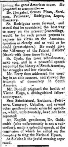 noticia del periódico The Standard and River Plate News, del 14 de julio de 1864. (Sres. Antonio Piran, Máximo Sartirana, Juan Pietronave, Eduardo Rodríguez, Cayetano Lopez, Joaquín Canavery.)